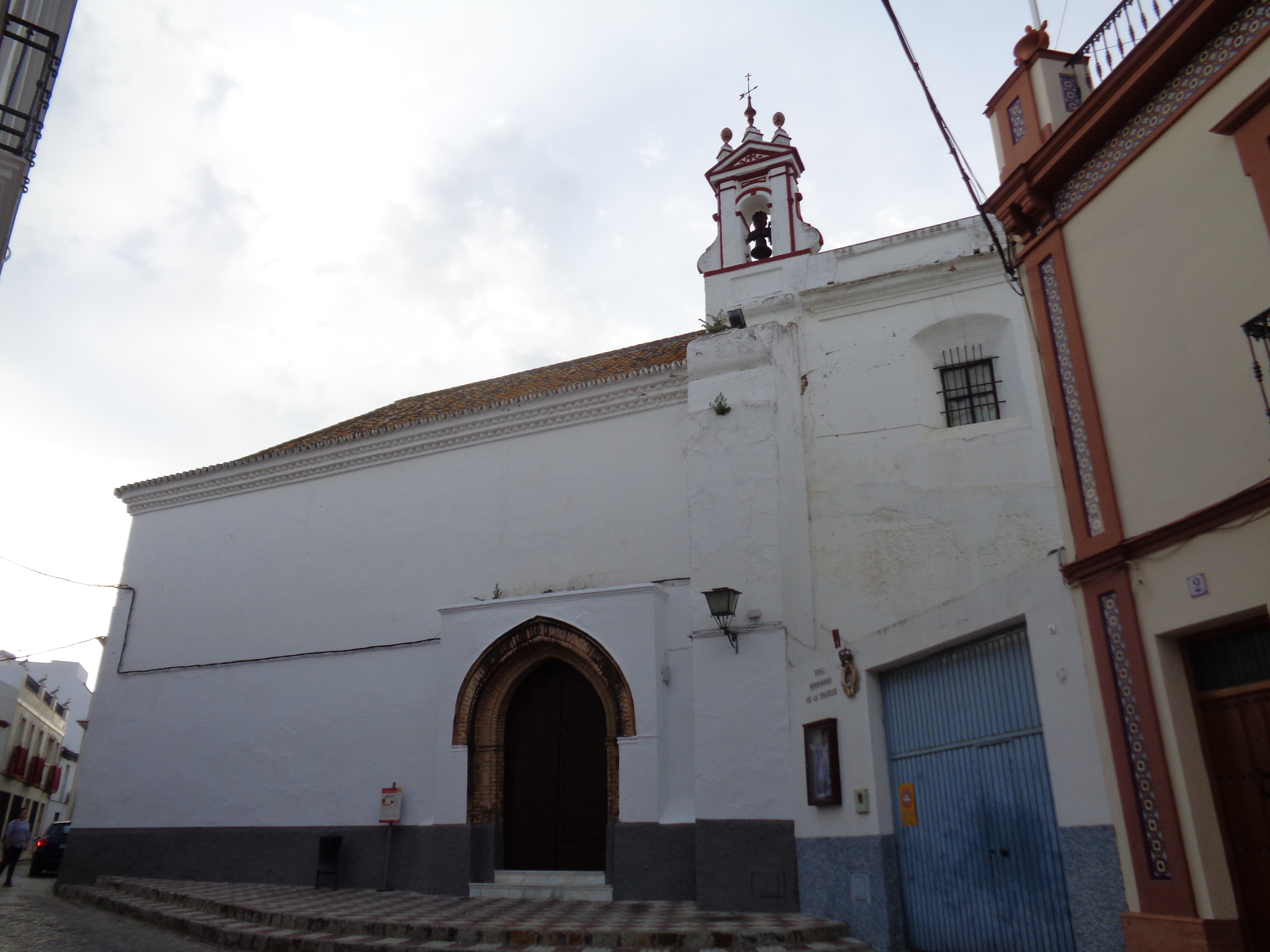 Lateral de la capilla de San Gregorio de Osset, en Alcalá del Río, provincia de Sevilla.